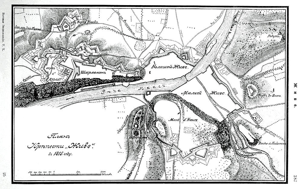 Это изображение было использовано для иллюстрирования статьи «Живе» опубликованной в десятом томе «Военной энциклопедии», который был издан книгоиздательским товариществом И. Д. Сытина в 1912—1913 гг. в столице Российской империи городе Санкт-Петербурге.